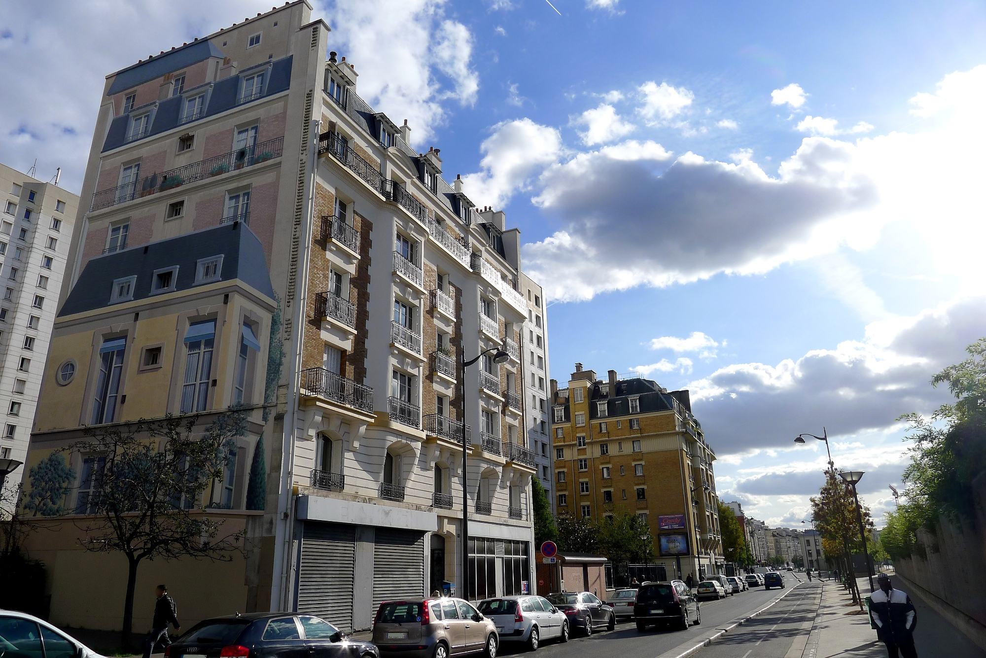 Rue d'Aubervilliers - Paris XVIII-XIX